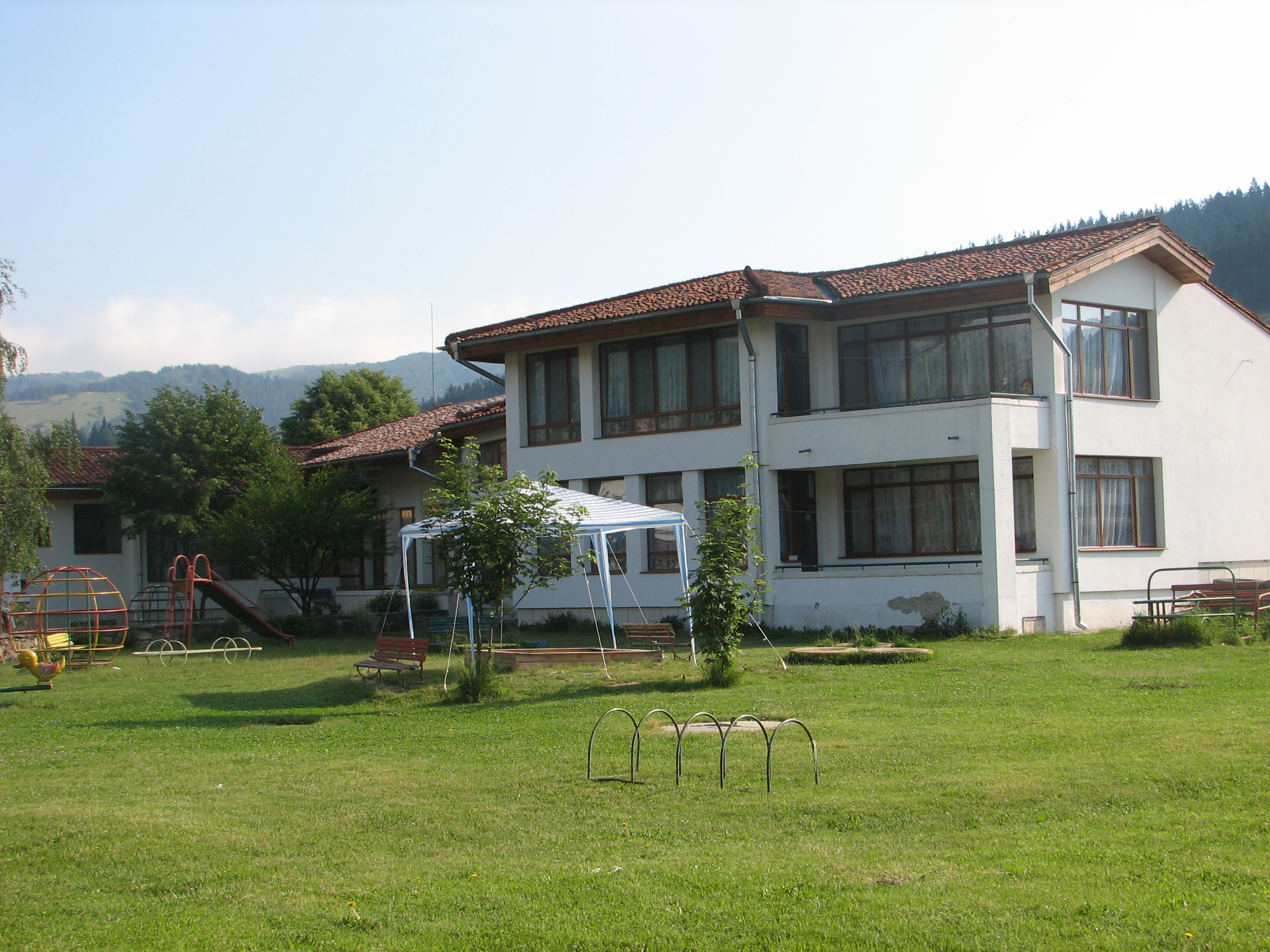 Детската градина - Копривщица